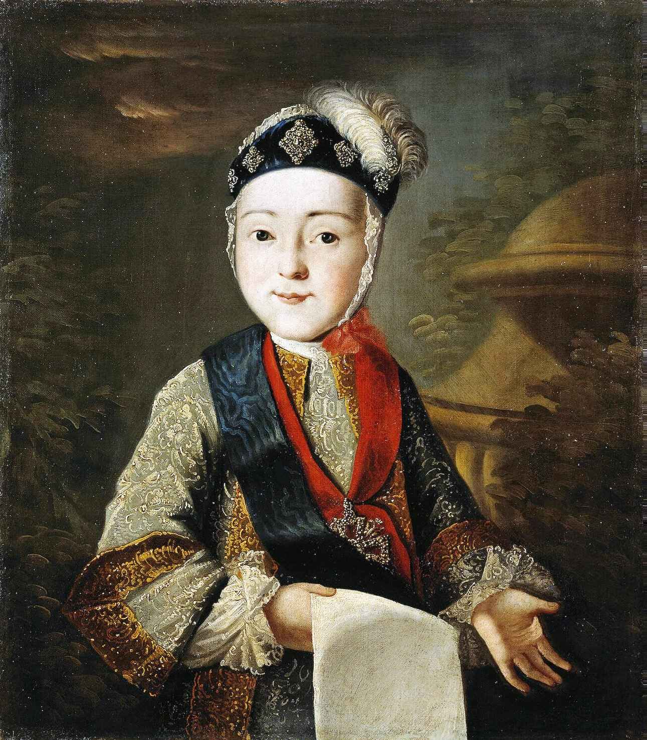 Портрет великого князя Павла Петровича в детстве